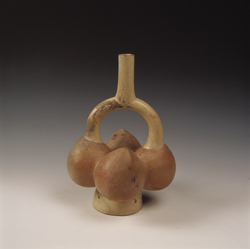 Botella Mochica representando Lúcuma. Museo Larco. Lima-Perú